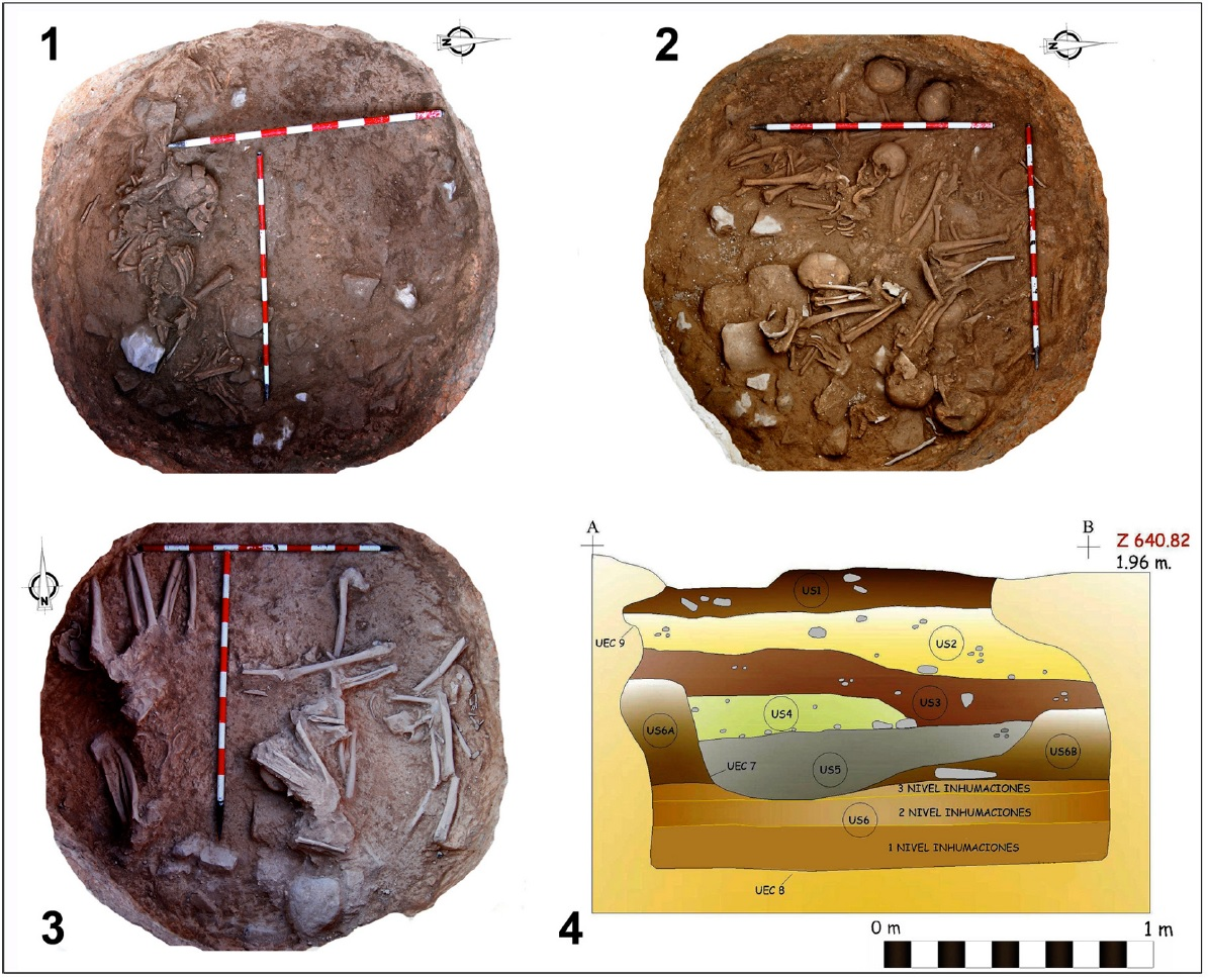 Sepultura E.125 del poblado calcolítico “Venta del Rapa” (Mancha Real, Jaén) con los tres niveles de inhumaciones y el perfil estratigráfico documentado.